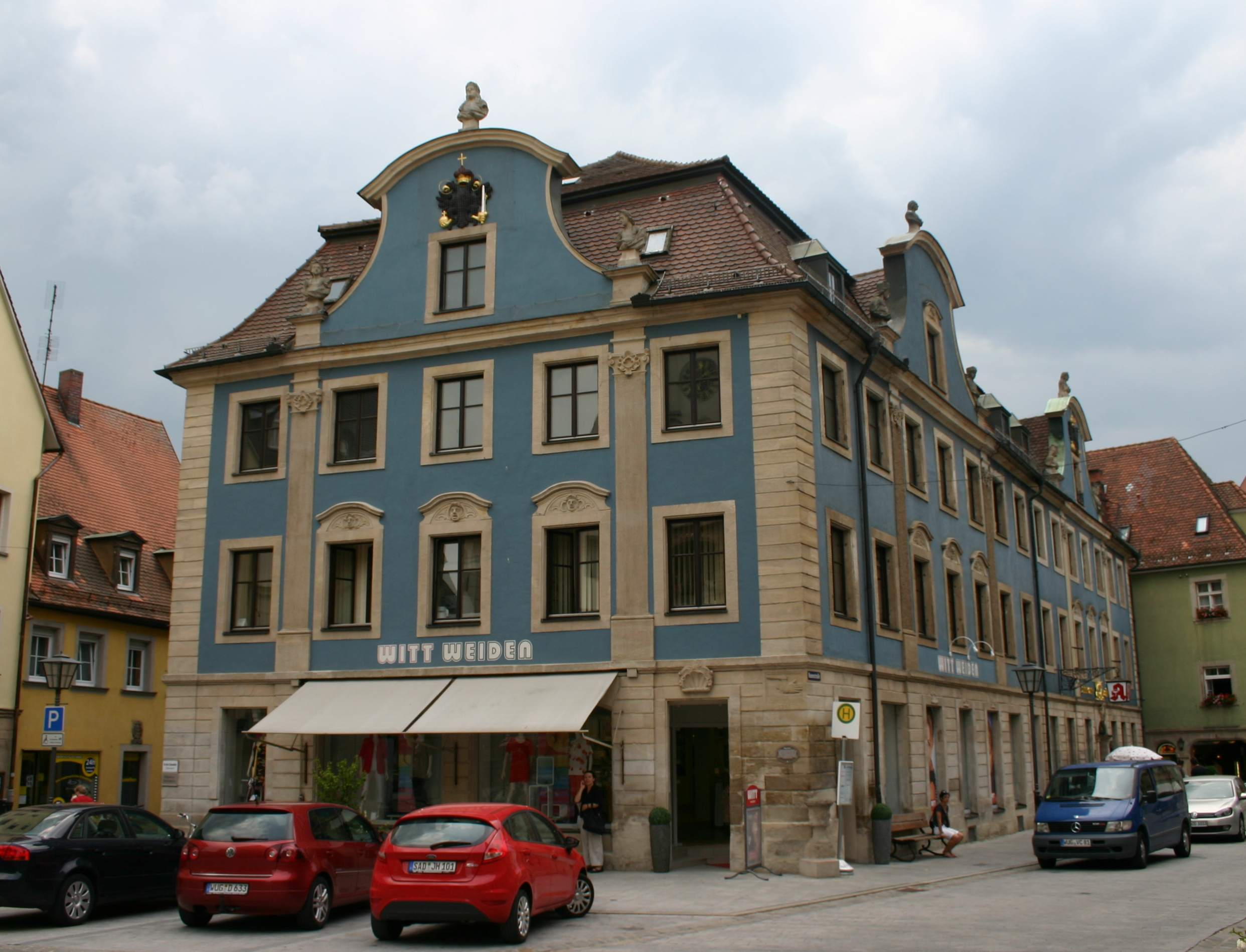 Blaues Haus Weißenburg